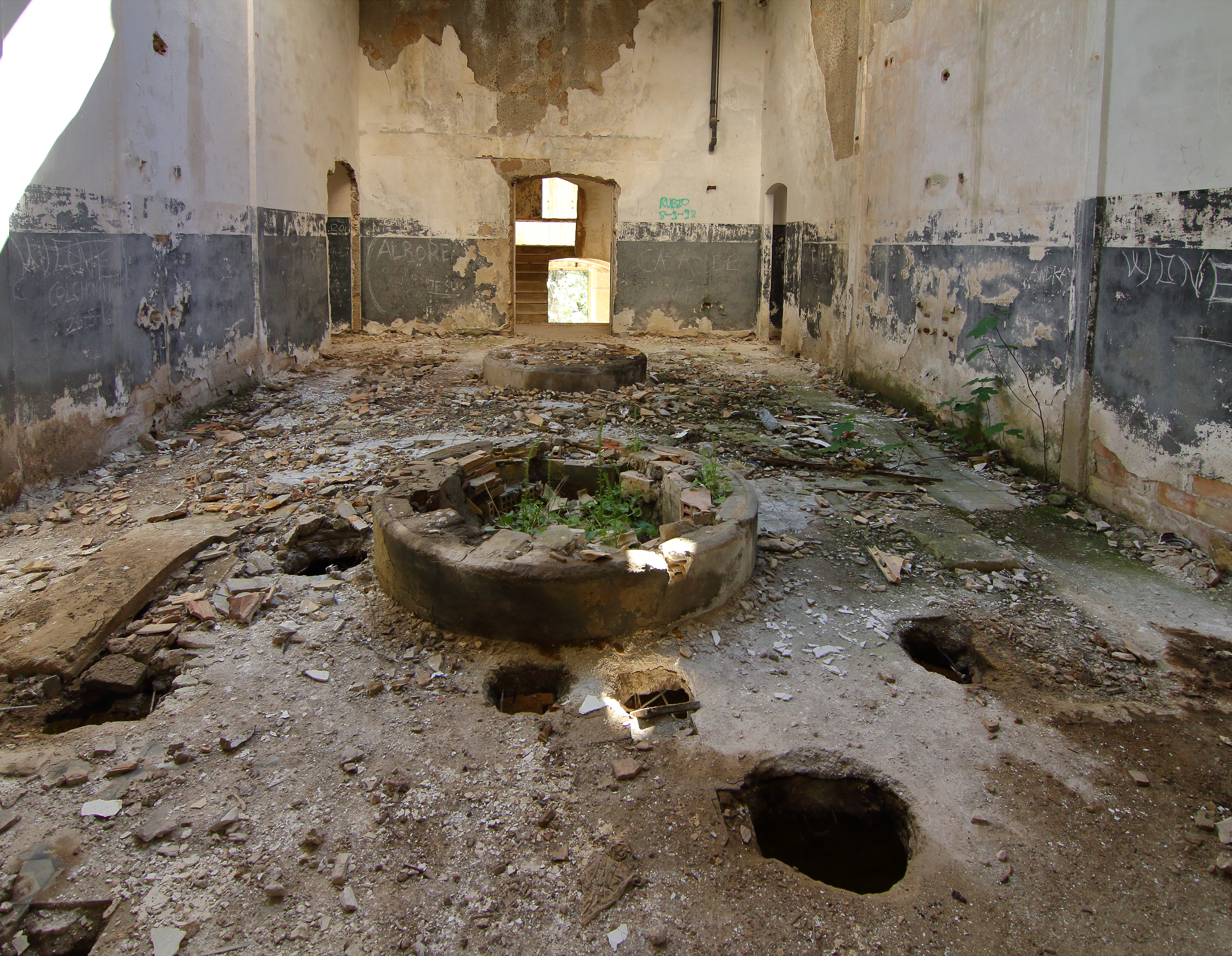 Central eléctrica El Molinar, interior, 01